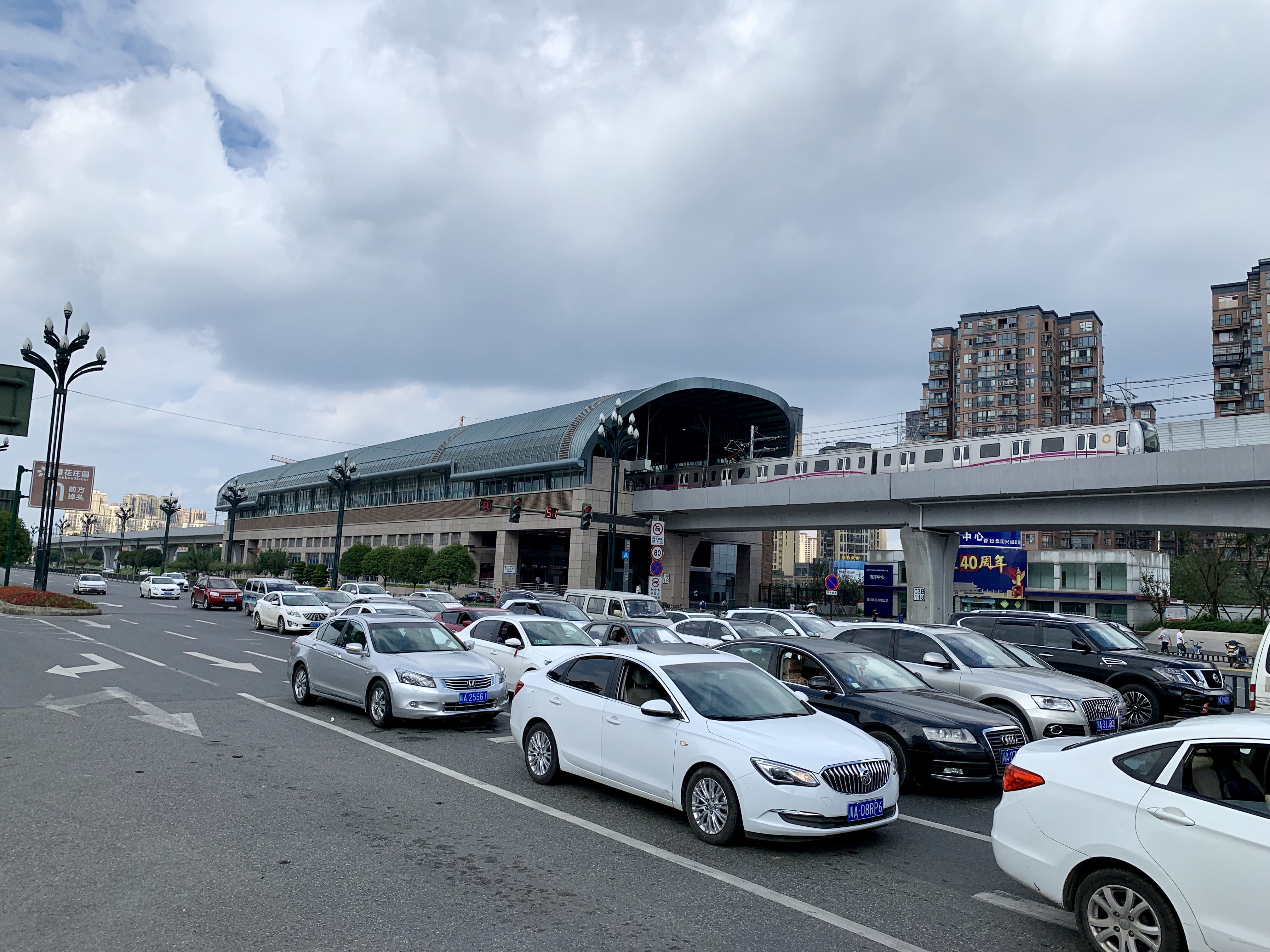 成都地铁三河场站